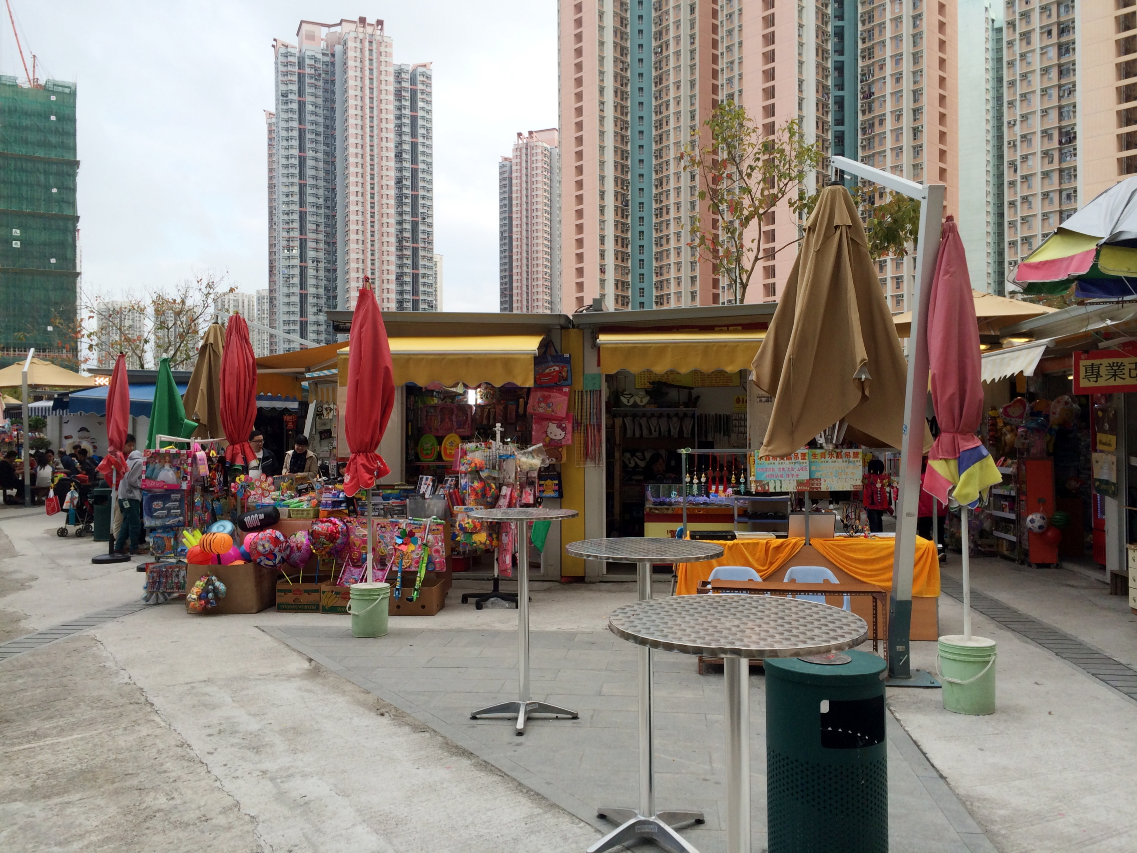 Tin Sau Bazaar shops view